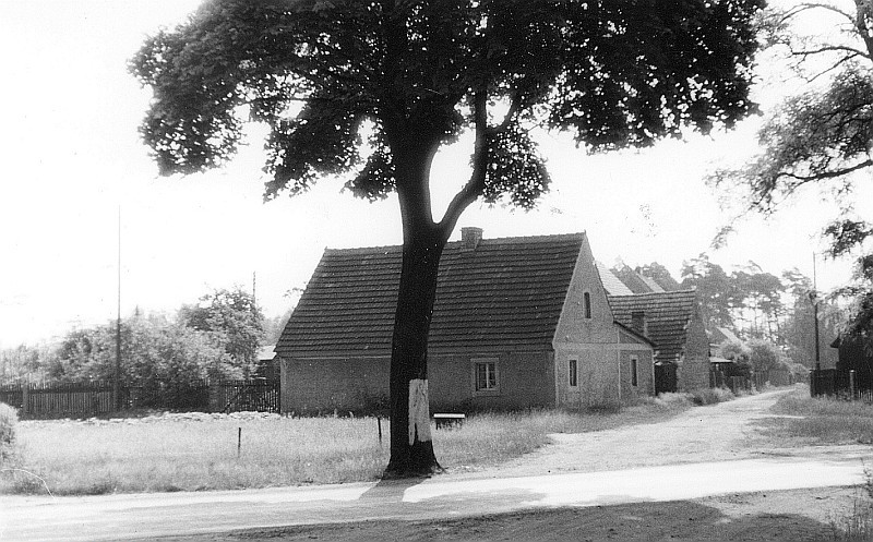 Original image description from the Deutsche Fotothek Weißkeißel. Ehem. Windmüllerhaus